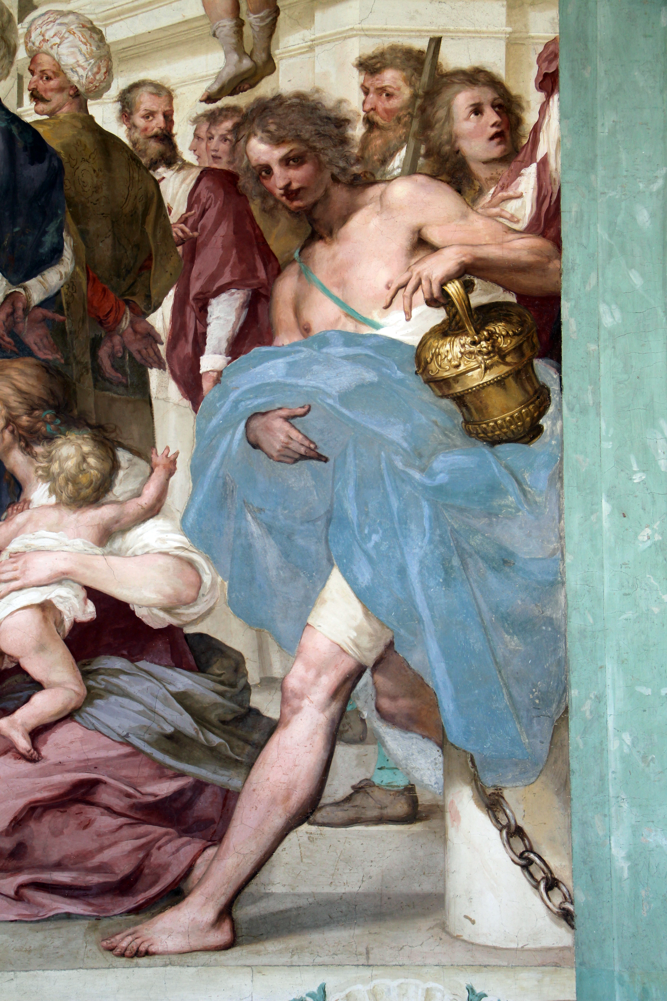 Villa medicea della Petraia - MIBAC This is a photo of a monument which is part of cultural heritage of Italy.